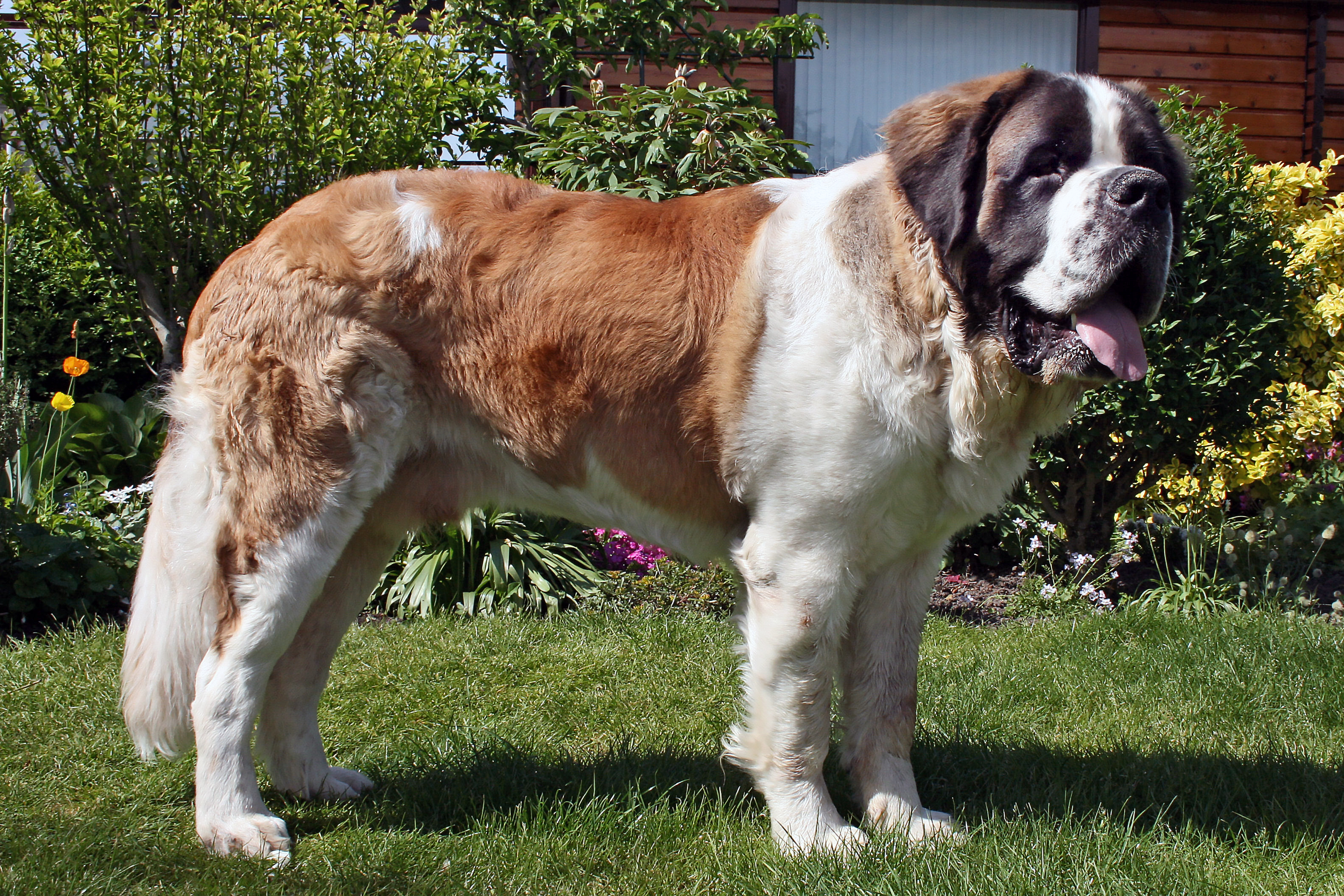 Hummel is een oud-Europese/Duitse langhaar Sint Bernard reu en op deze foto 14 maanden oud.